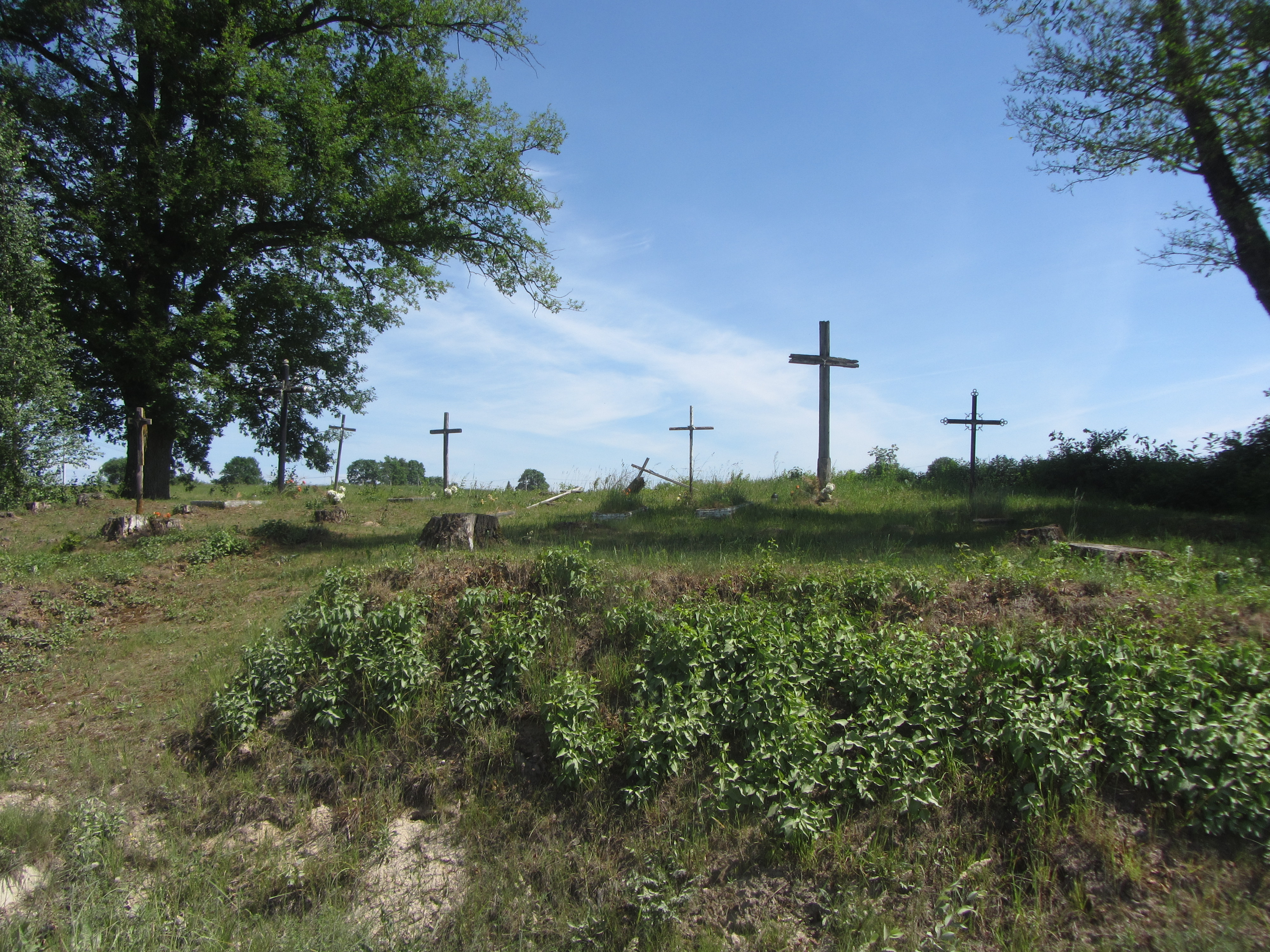 Kruonio sen., Lithuania